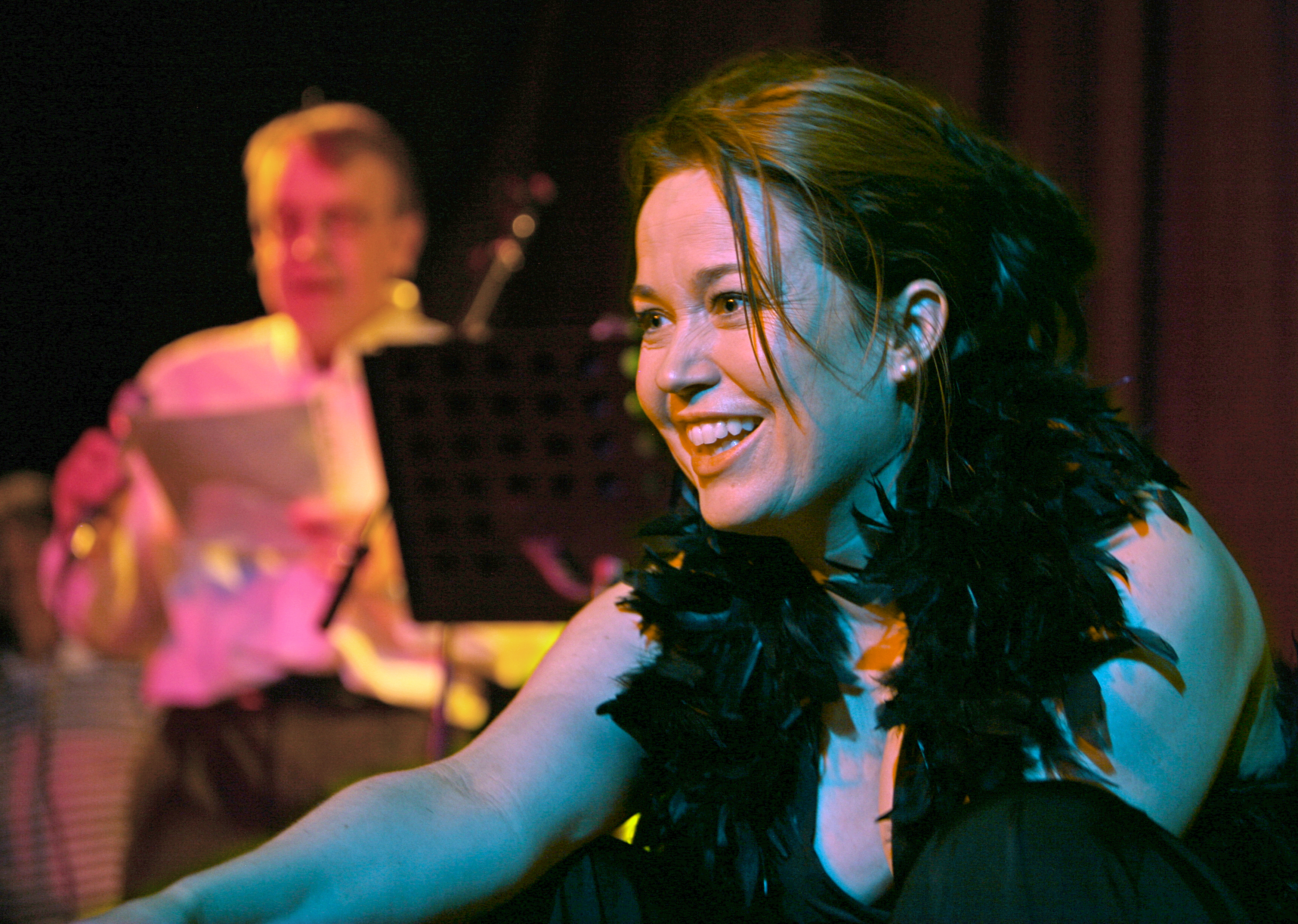 Mamma Mia-allsång på Vaxholms Bion med Mats Törnqvist och Karolina Rahm 2009.